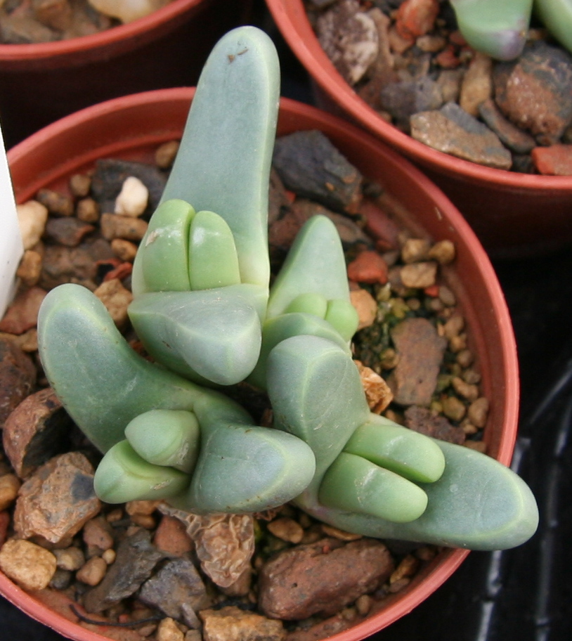 Argyroderma fissum MG1334.7 in Kultur bei Kakteen-Haage in Erfurt